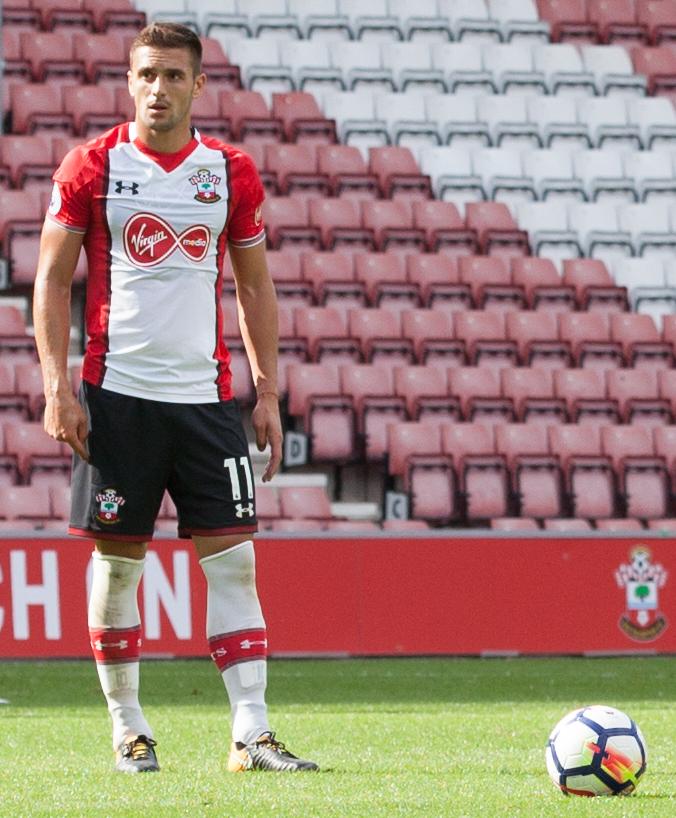 Image by Steve Hogg